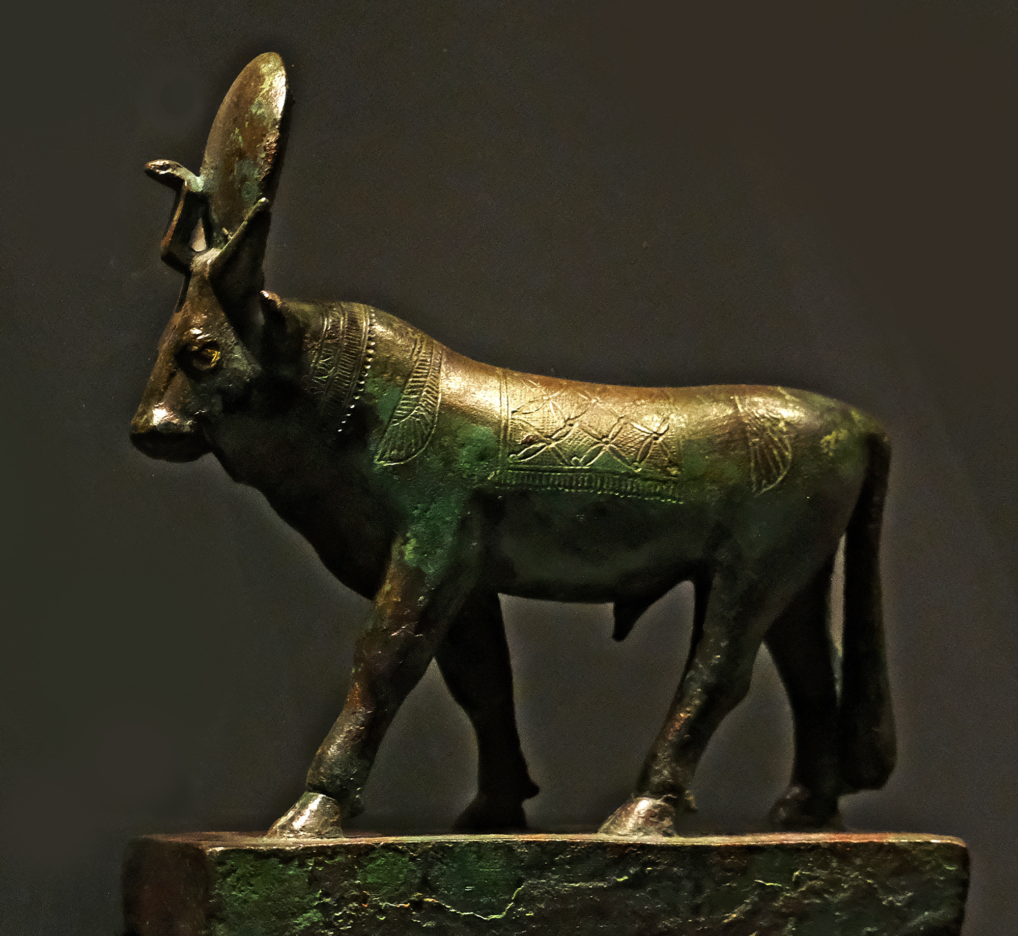 Taureau sacré APIS - Louvre